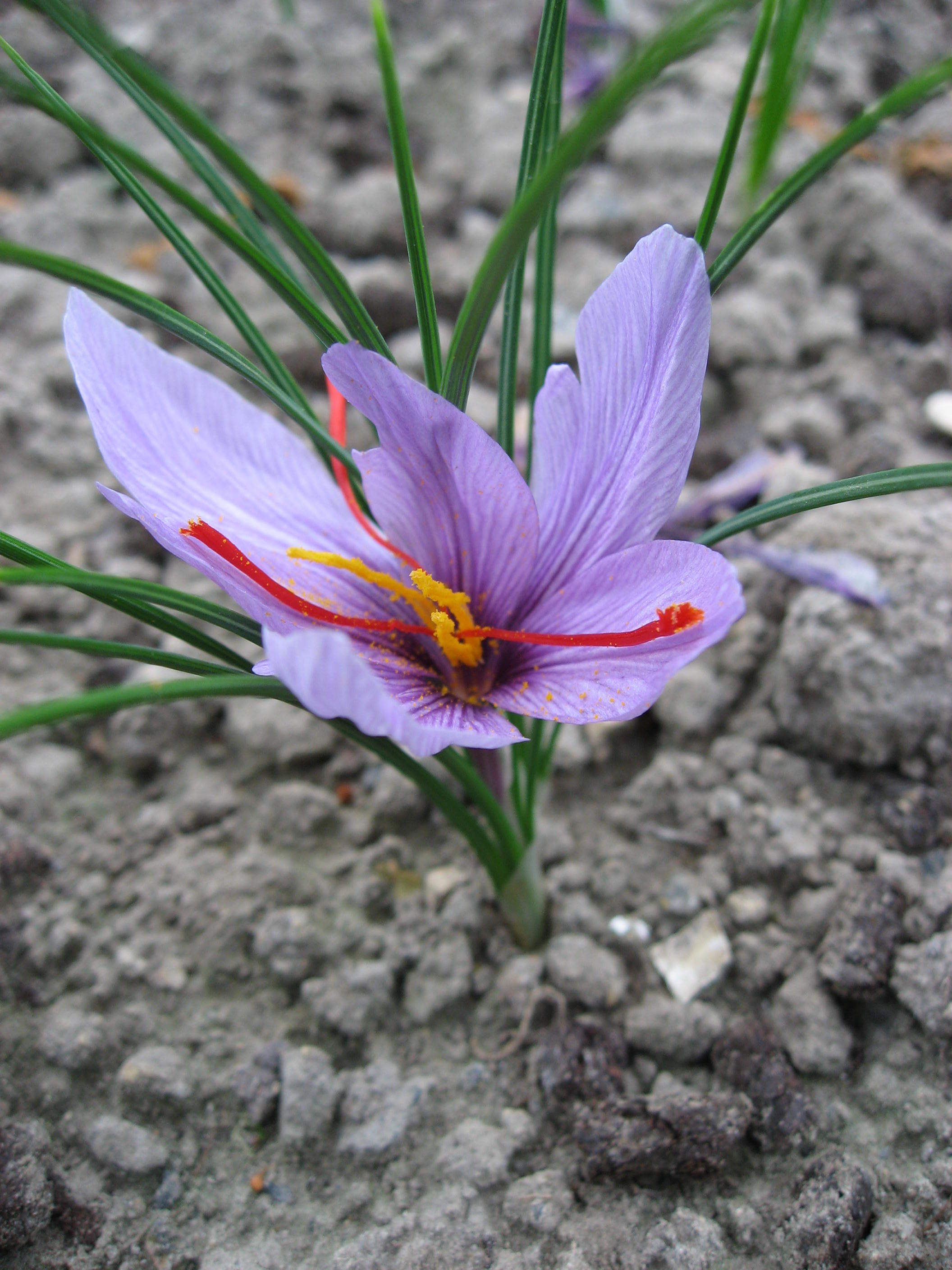 Crocus sativus in Conservatoire National des Plantes à Parfum Map: 48° 23' 49" N 2° 28' 45" E